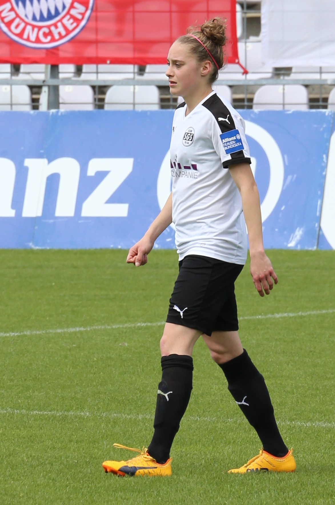 Jacqueline Klasen (SGS Essen) beim Frauen-Bundesliga-Spiel FC Bayern München gegen SGS Essen am 21. Mai 2017 im Stadion an der Grünwalder Straße (Ergebnis war 2:0)